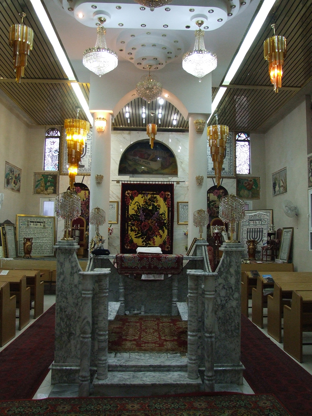 בנית הכנסת בישיבת תיקוני אליהו ומעיניי הישועה